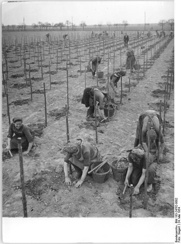 LPG Riesa, Anpflanzen von Hopfen Zentralbild Siegert-24.5.1954 LPG "Clara Zetkin" baut Hopfen an. Die LPG "Clara Zetkin" in Riesa, Pechra baut auf einer 2, 5 ha grossen Fläche zum erstenmal Hopfen an. Die Stecklinge für den Hopfen wurden aus der Tschechoslowakischen Repuplik geliefert, deren Hopfenanbau in der ganzen Welt bekannt ist. Die Stecklinge müssen 50 cm tief in den Boden eingefplanzt werden und brauchen besonders guten Boden. Im nächsten Jahr wollen die Genossenschaftsbauern auf einer 18 ha grossen Fläche Hopfen anbauen. UBz: Die Felbaubrigade der LPG beim Hopfenanbau.